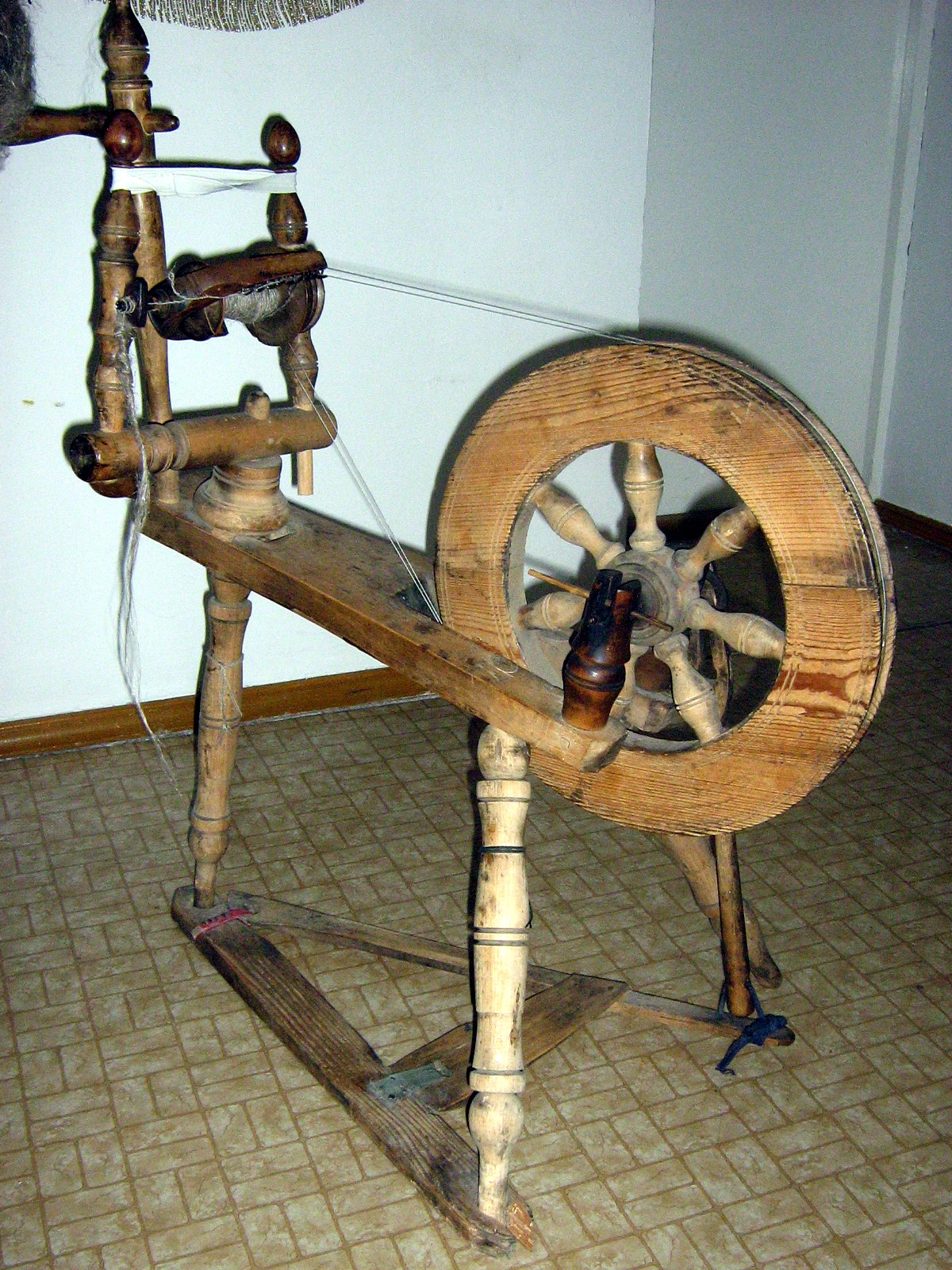 Verpimo ratelis Foto: Algirdas, 2007-05-16